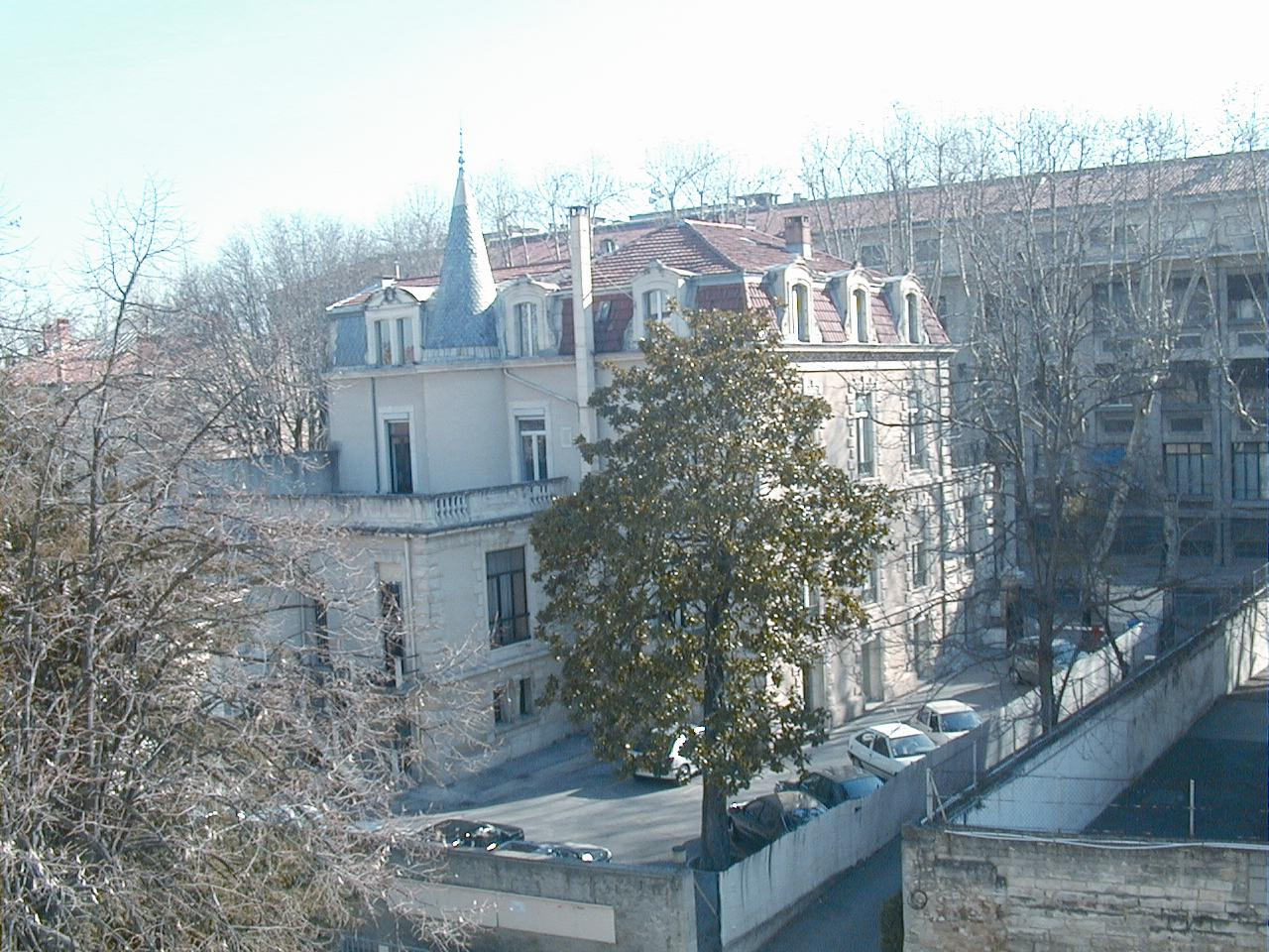 Le bâtiment abritant la présidence de l'Université Montpellier 1 Photographie personnelle